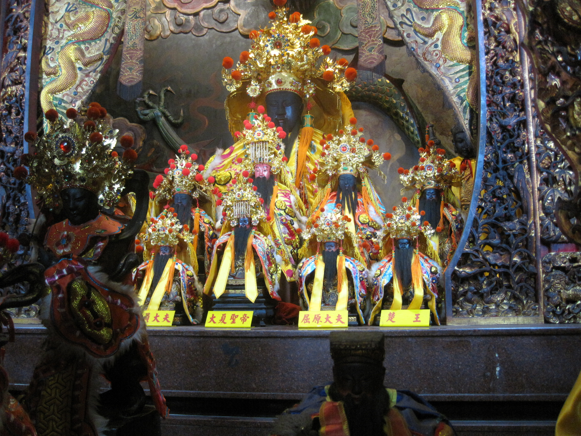 鹽行禹帝宮神像